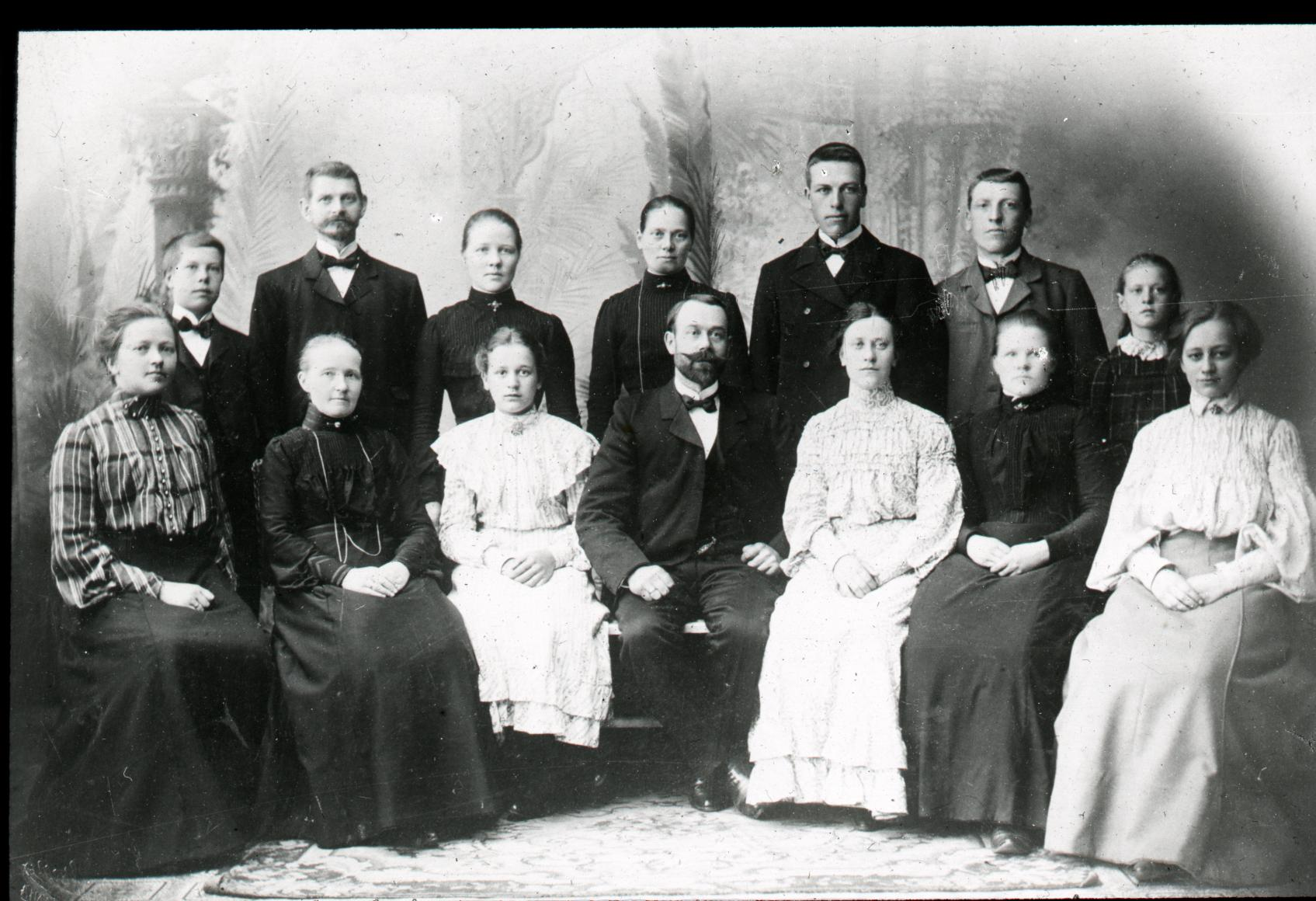 Fotograf ukjent. (Arkivref.: PA0867 Fg7_34)